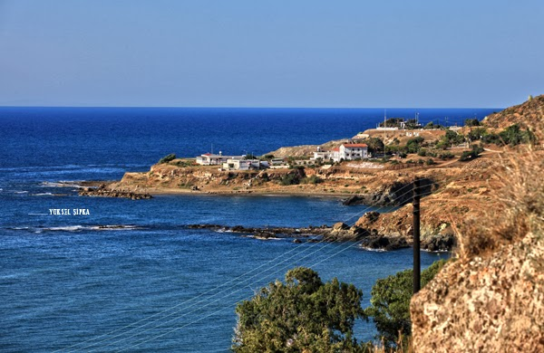 Erenköy sahili